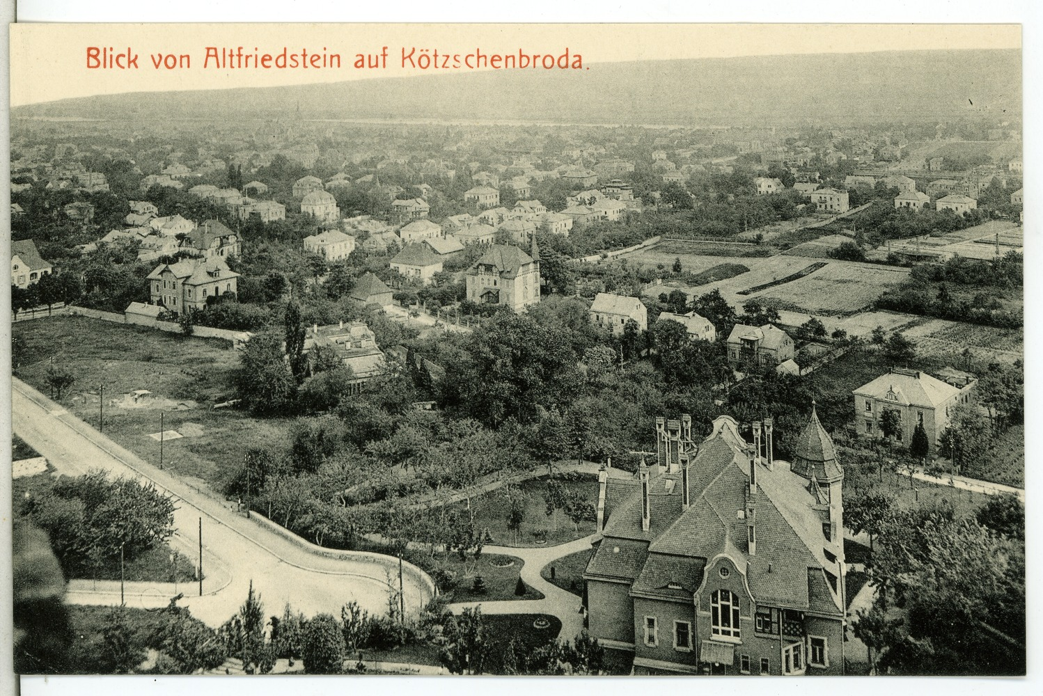 Radebeul; Blick von Altfriedstein This postcard is from publisher Brück & Sohn in Meißen ( postcard has a unique number 13276 and is available in a higher resolution at the publisher. This images was uploaded in a cooperation project between Wikipedians and the publisher.